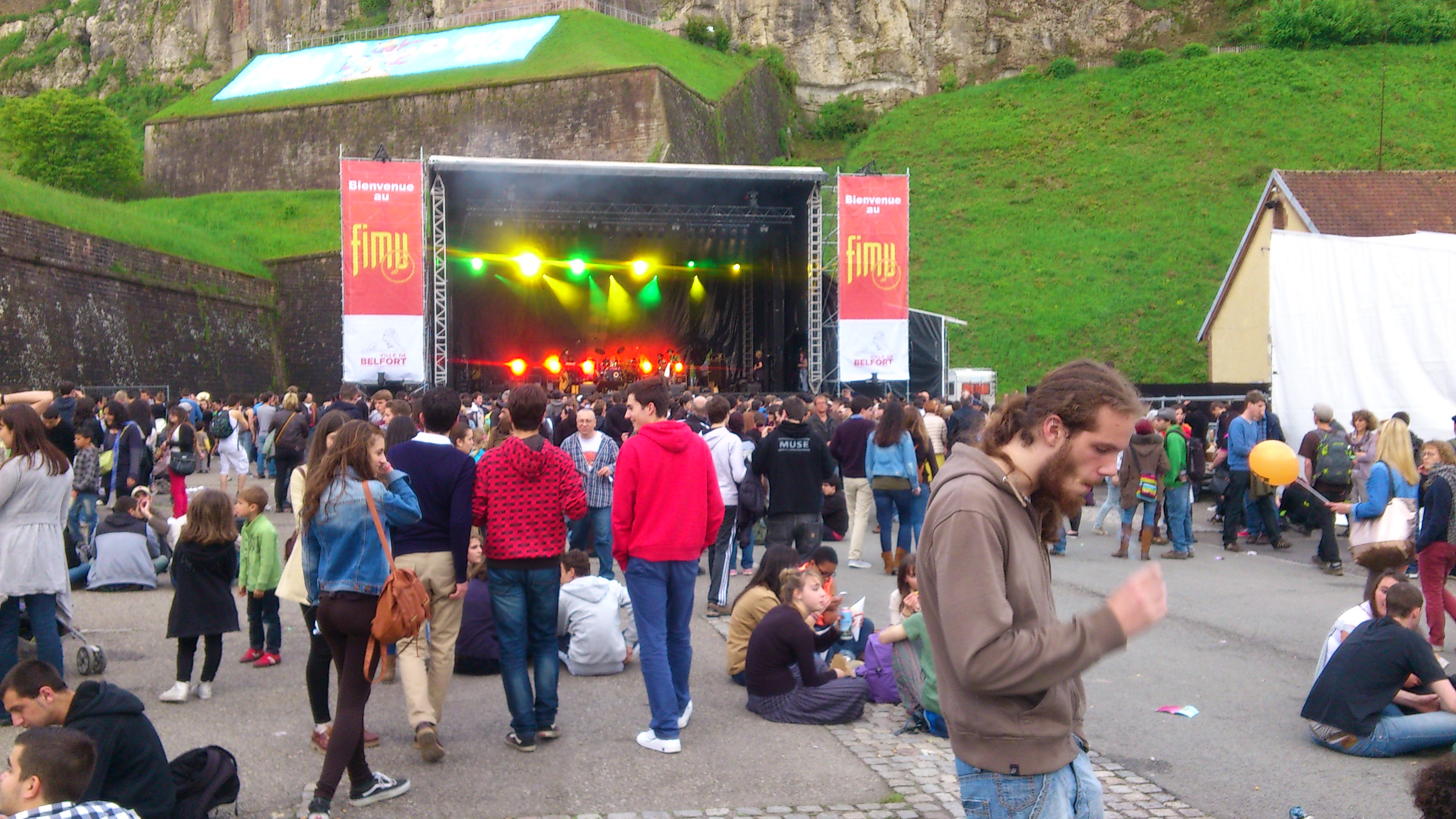 Festival Internacional de Música Universitaria 2013